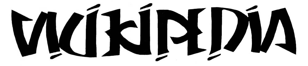 Ambigramme « Wikipedia »